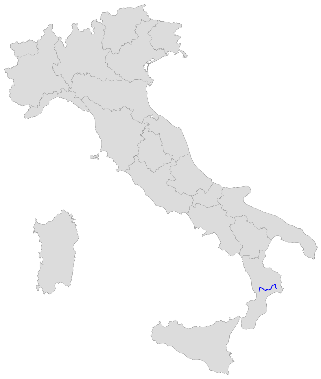 Percorso della SS 109 della Piccola Sila